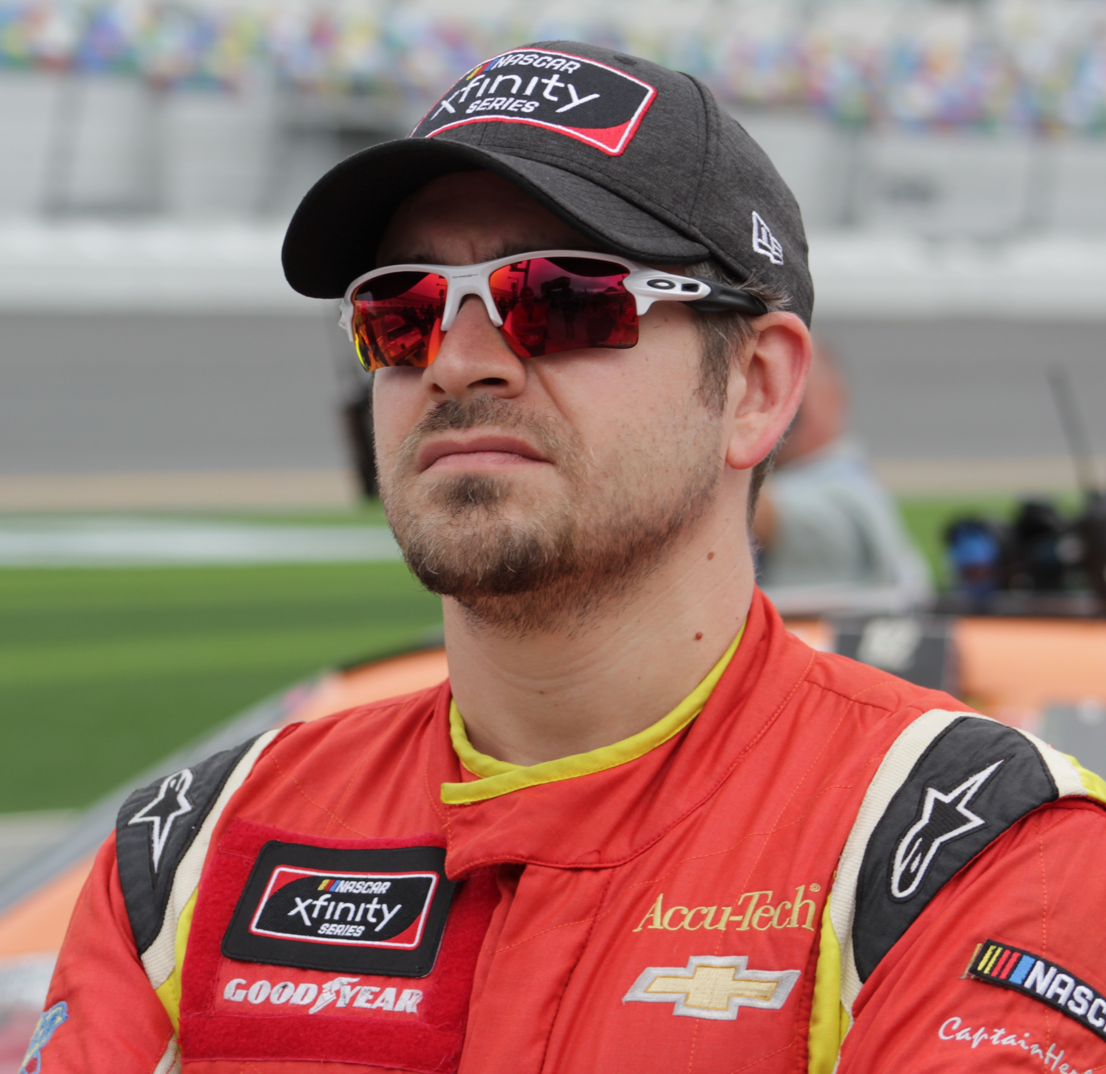 2018 Daytona 500